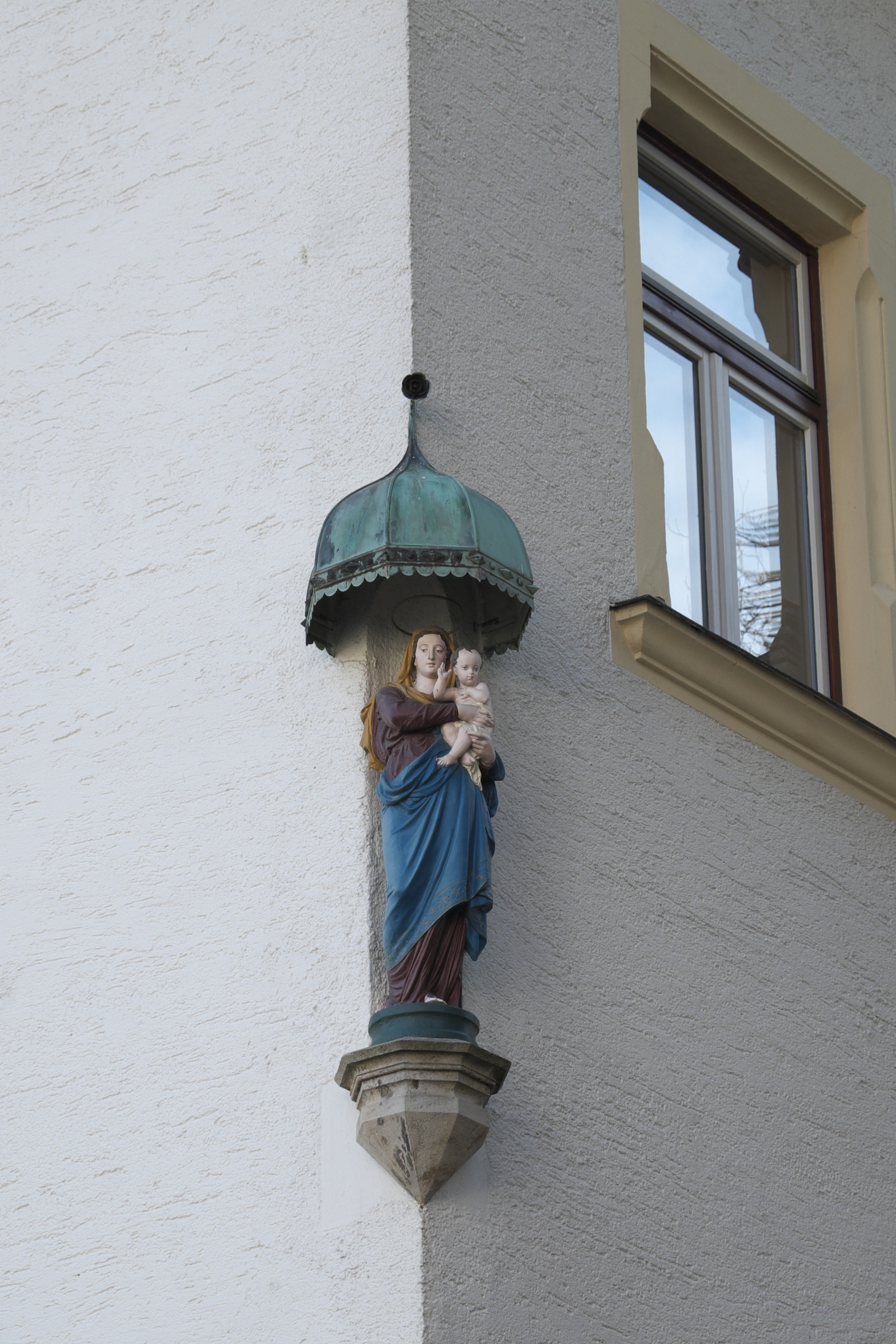 Bierbaumstraße 15 in Pasing im Stadtbezirk Pasing-Obermenzing in München (Bayern/Deutschland), 1899–1900 von Heinrich Volbehr erbaut, Madonna mit Kind